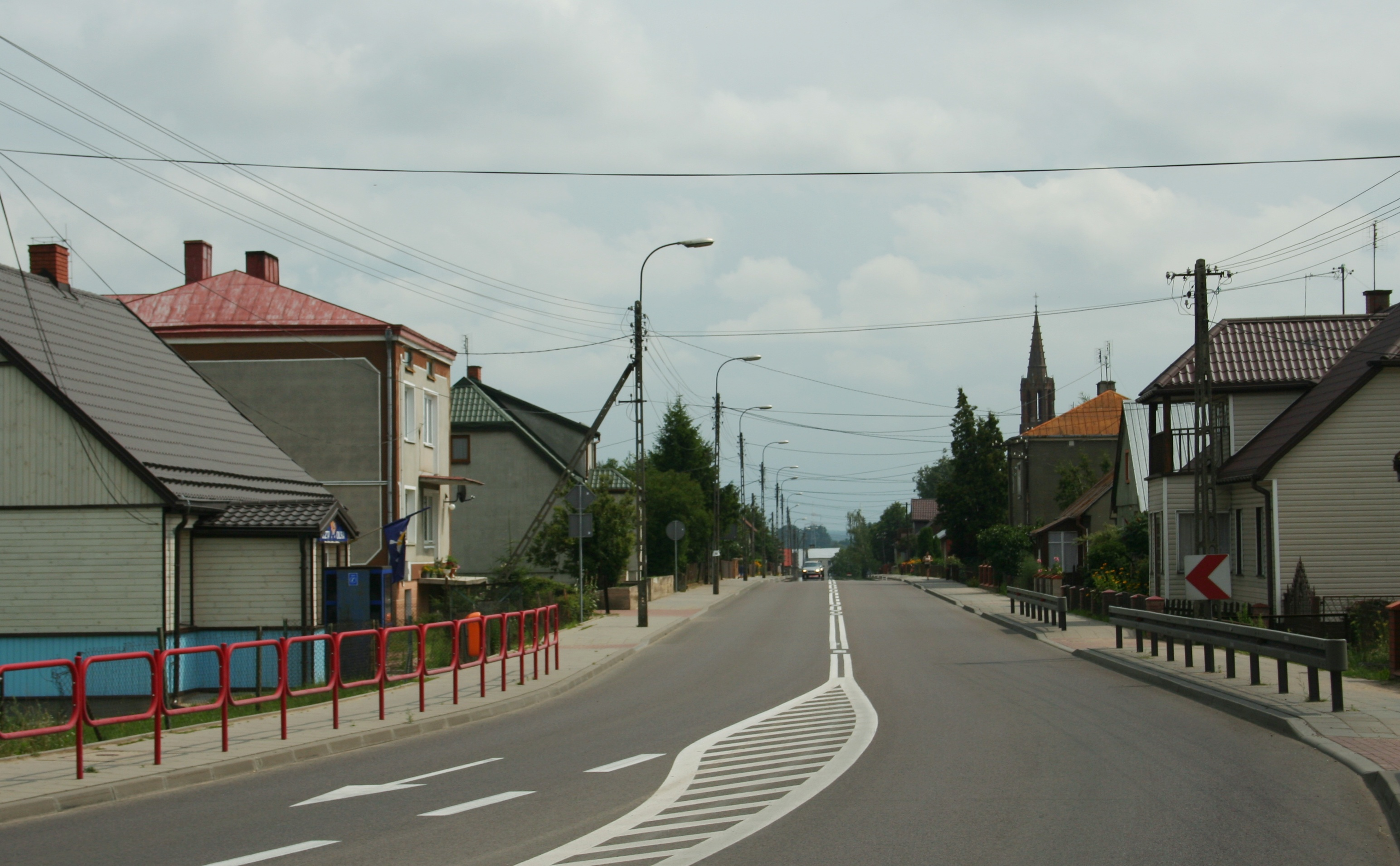 Sztabin droga E67, woj. podlaskie